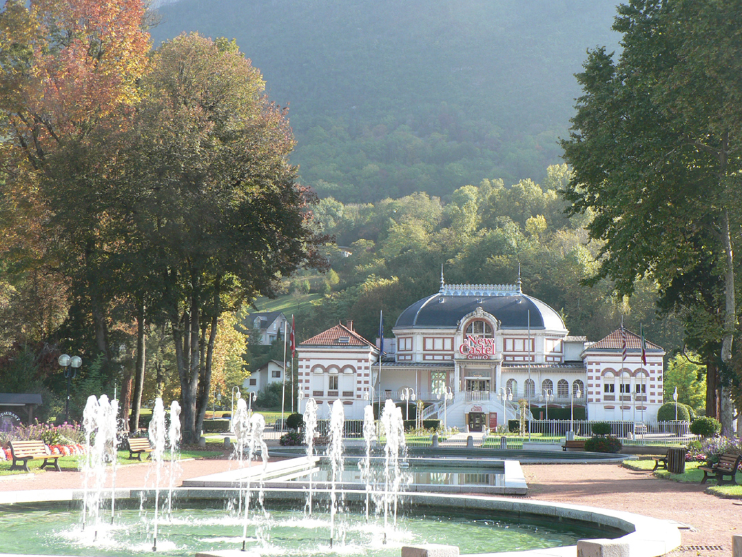 Challes les eaux casino new